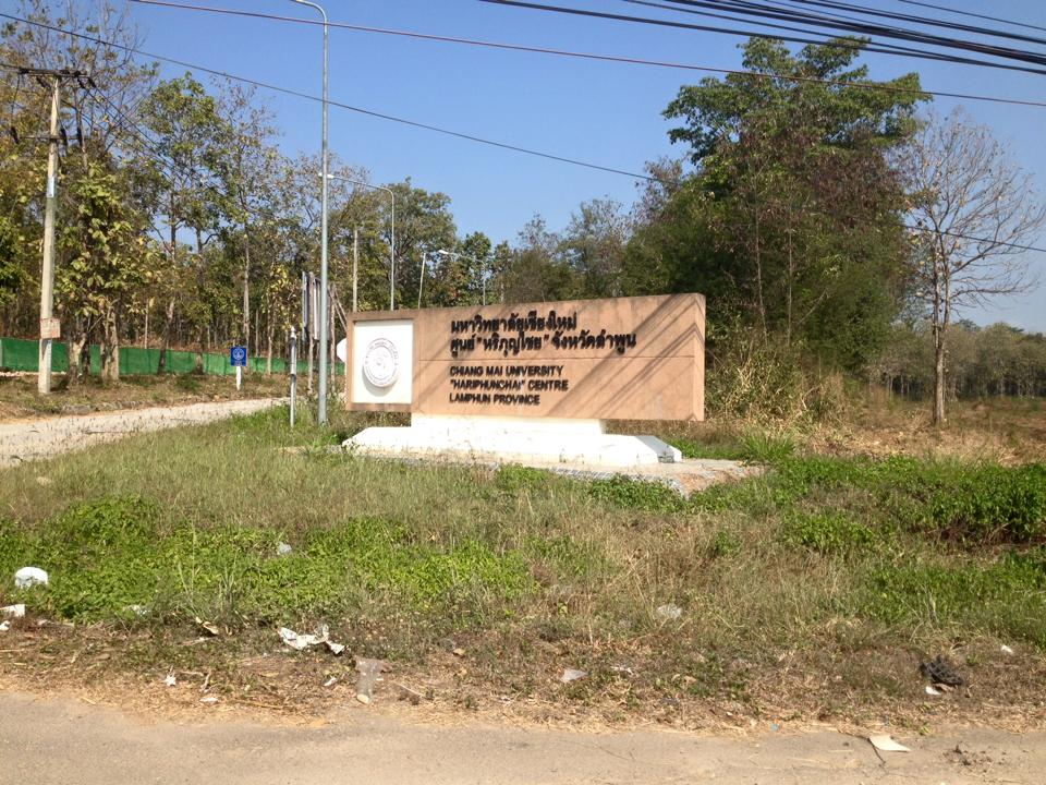 มหาวิทยาลัยเชียงใหม่